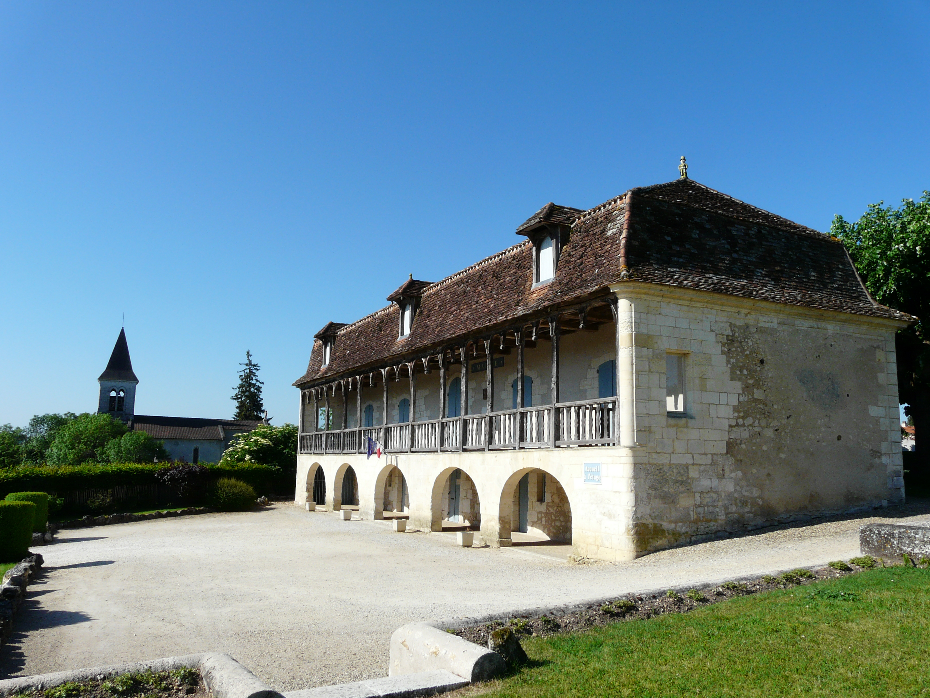 L'église et l'ancien presbytère de Saint-Front-de-Pradoux, Dordogne, France. Vue prise depuis le nord-nord-est.